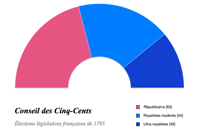 Constitution du Conseil des Cinq-Cents après les élections législatives de 1795.